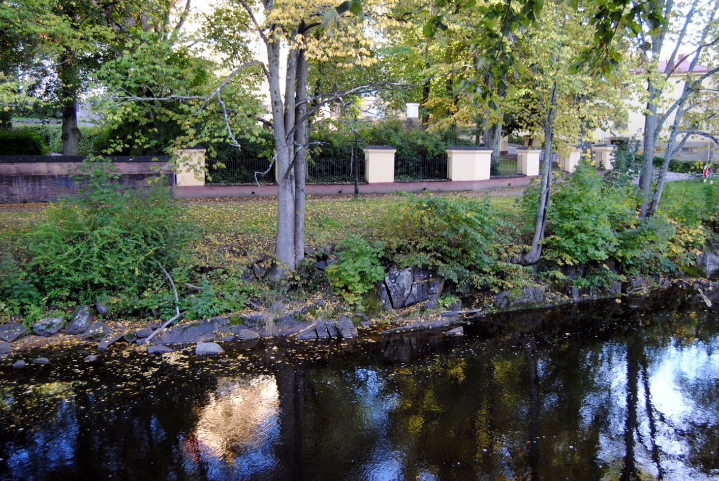 Här kan man se en av de platser där gävlesandstenen går i dagen precis vid gavleåns vattenbryn strax nedanför Gävle slott